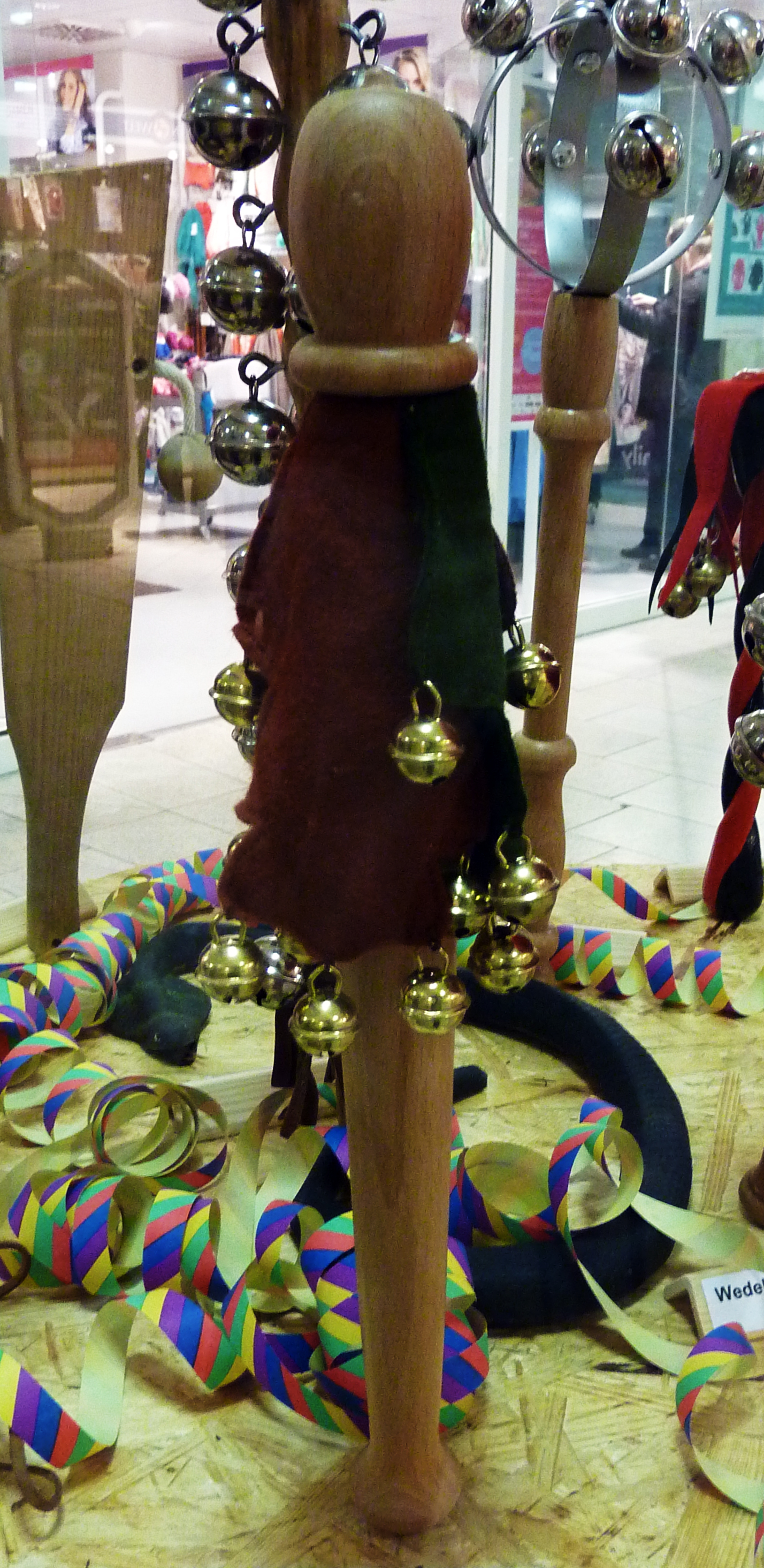 Eichelstab - Häsrequisit oder Narrenutensil der Eichel-Spättle, einer Häsfigur in der Narrenzunft Knerbli Berghaupten e.V. Exponat aus der Sammlung Peter Scharte aus der Ortenau, vom 14. Januar bis 13. Februar 2013 im Einkaufszentrum Schwarzwald City (Freiburg) unter dem Titel „Narrenrequisiten - vielfältig und kreativ“ ausgestellt.